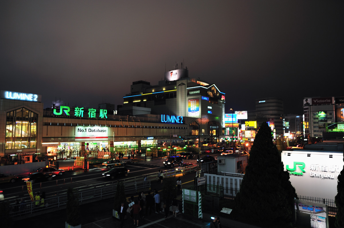 JR新宿車站